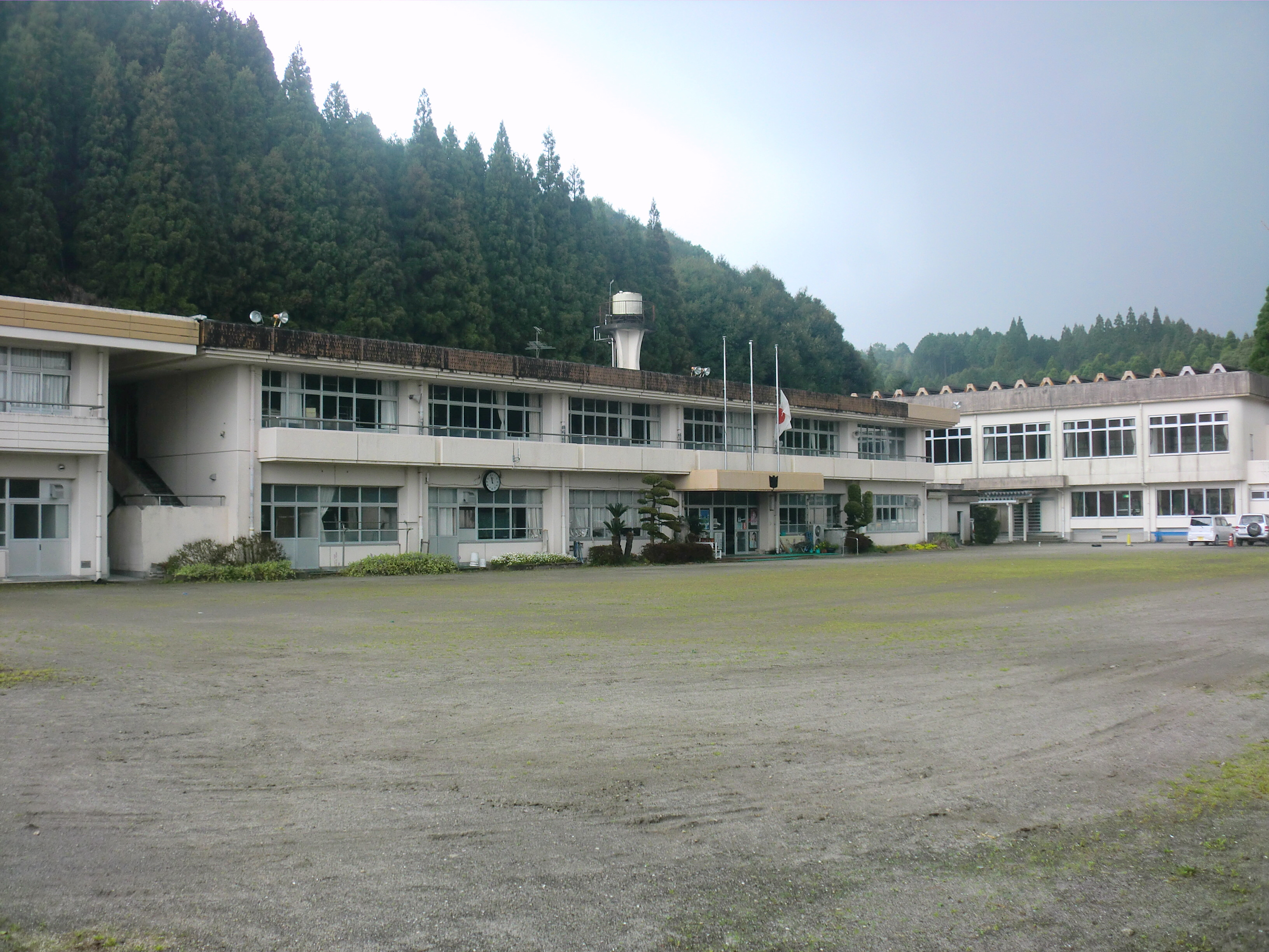 日置市にあった日置市立皆田（かいだ）小学校